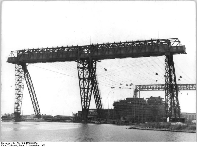 Warnemünde, Warnow-Werft Zentralbild Zühlsdorf 6.11.1956 Der vierte 10000 Tonner auf der Warnow-Werft in Warnemünde.